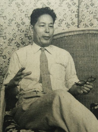 沼田多稼蔵